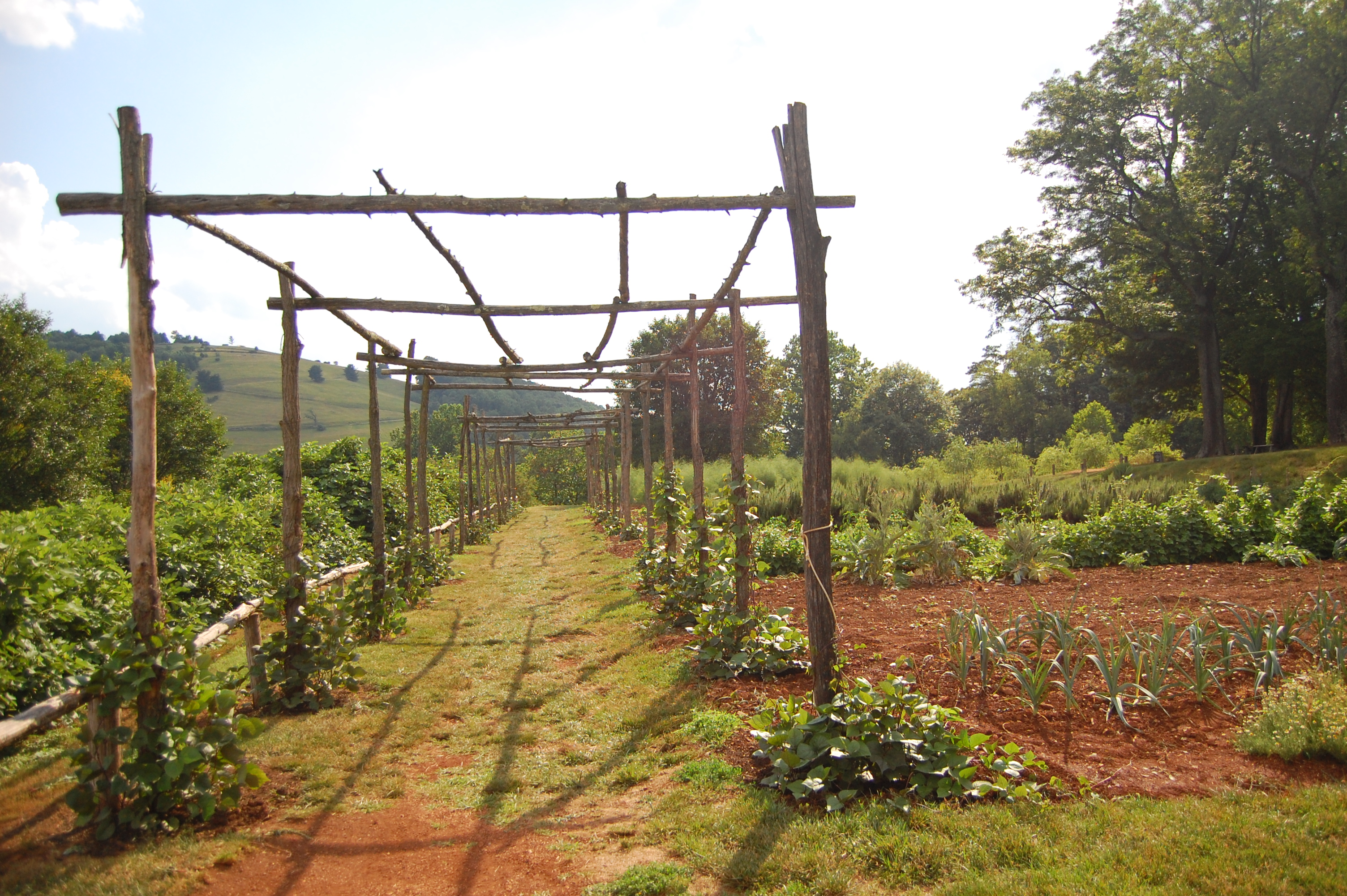 Treille pour vignes arbustives à Monticello